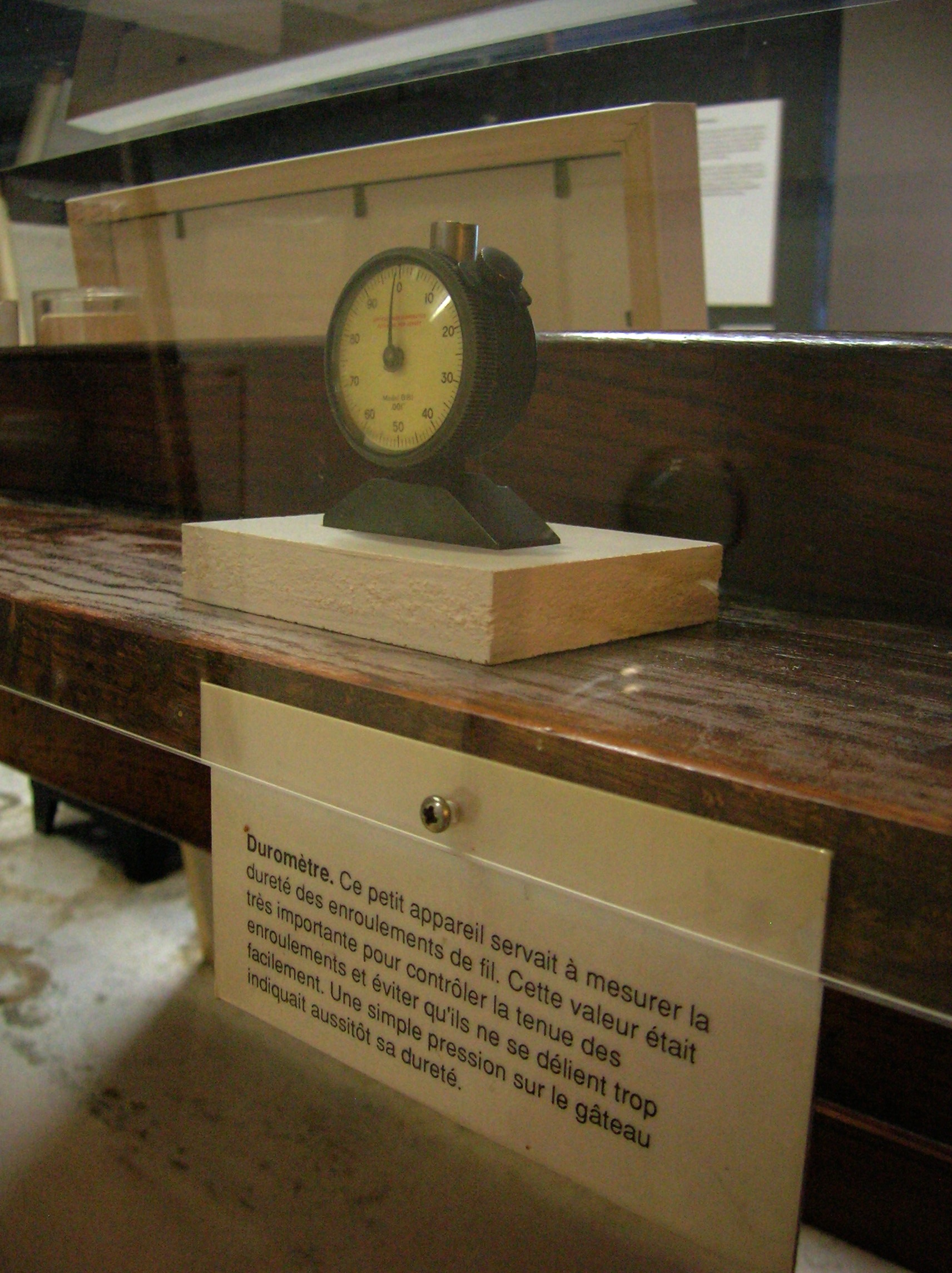 Musée de la viscose, Échirolles, Isère, France. Duromètre.